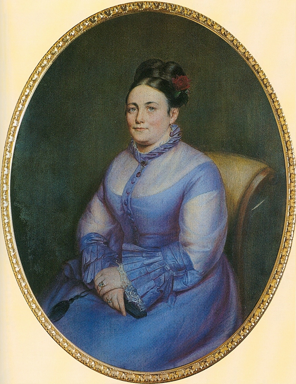 Hablawetz Franciska bécsi polgárlány, gróf Andrássy Dénes felesége.